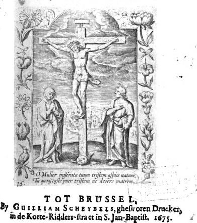 Tot Brussel, By Guilliam Scheybels, ghesworen Drucker, in de Korte-Ridders-straet in S.Jan-Baptist, 1675